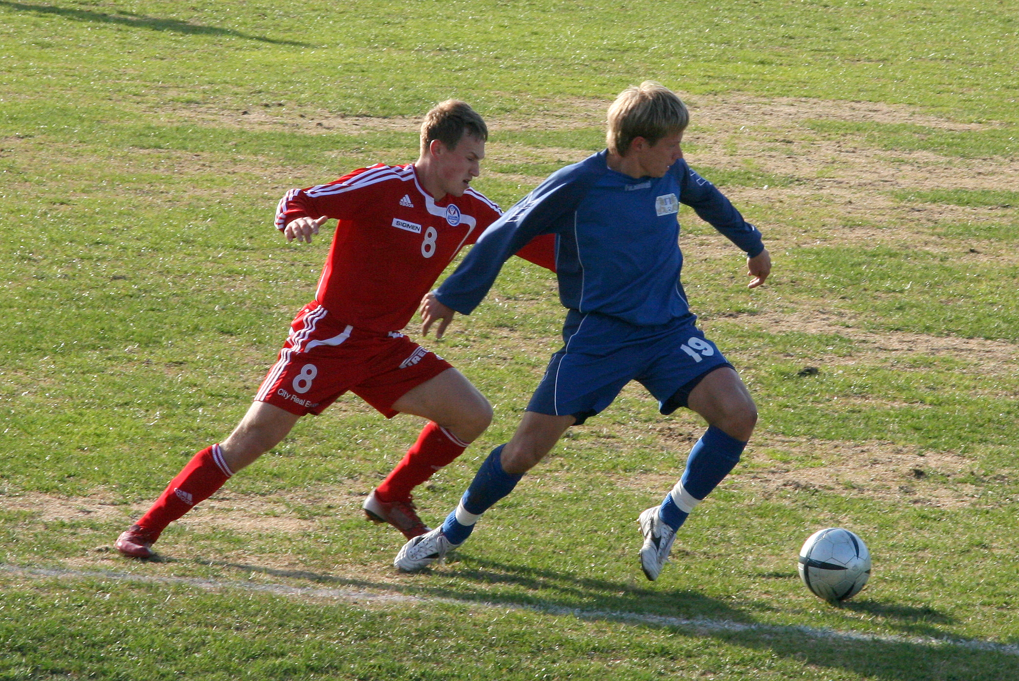 Latvian Virslīga football match, #19 Dmitrijs Skobļakovs and #8 Aleksejs Višņakovs battling for ball